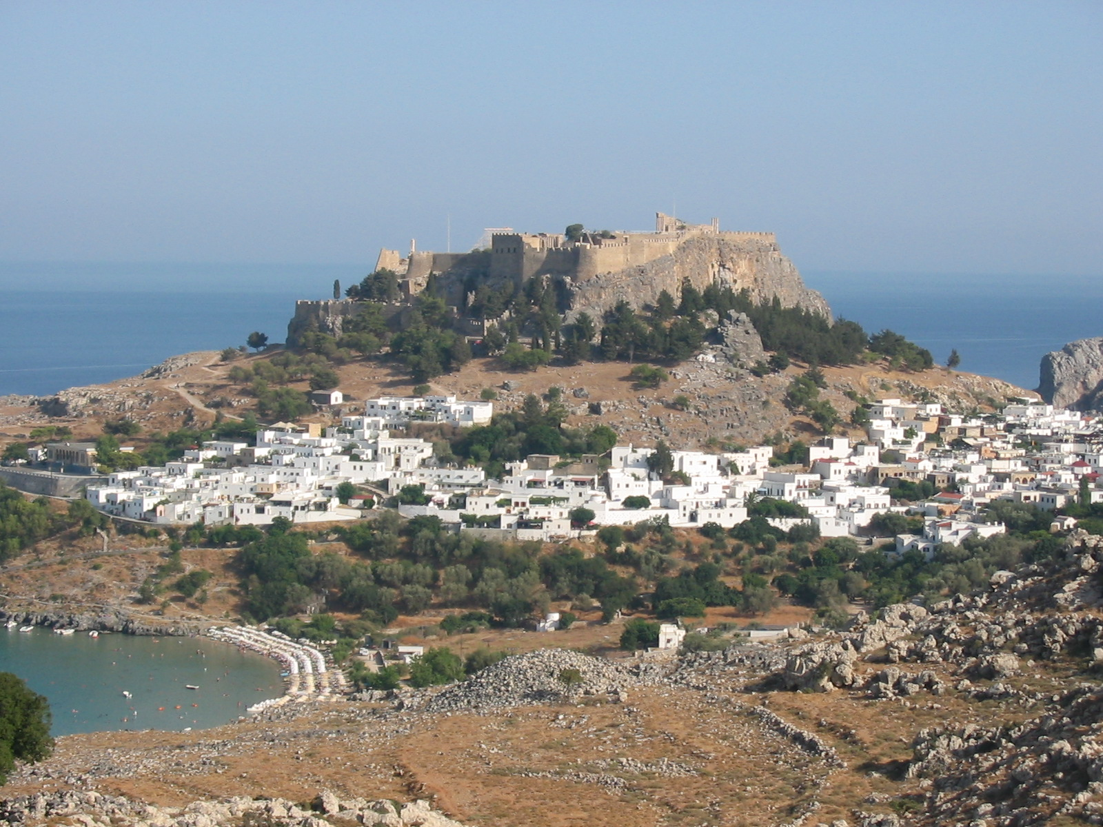 Lindos (Rhodes-Grèce)